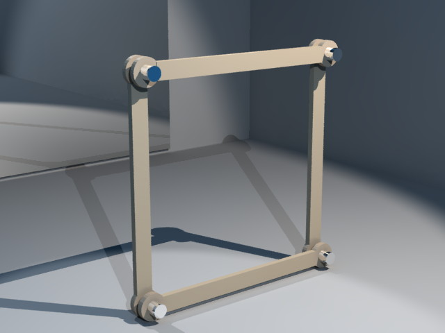 Voorbeeld van een statisch onderbepaald vakwerk: de constructie kan vrij deformeren tot een parallellogram. (Gebruikte software: Blender/YafRay).